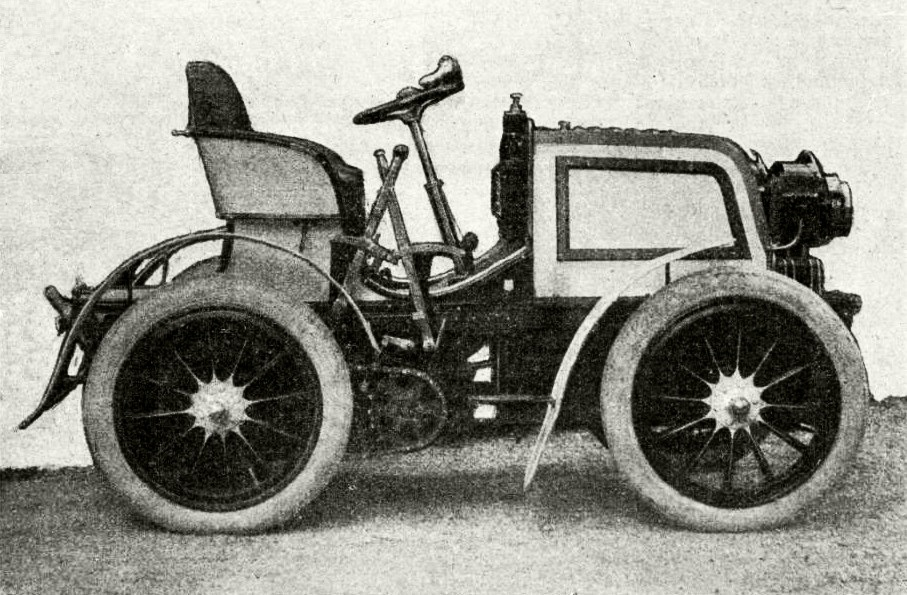 Une Daimler phoenix 24 hp 1900 d'Emil Jellinek - La Vie au Grand Air du 4 février 1900, p.267